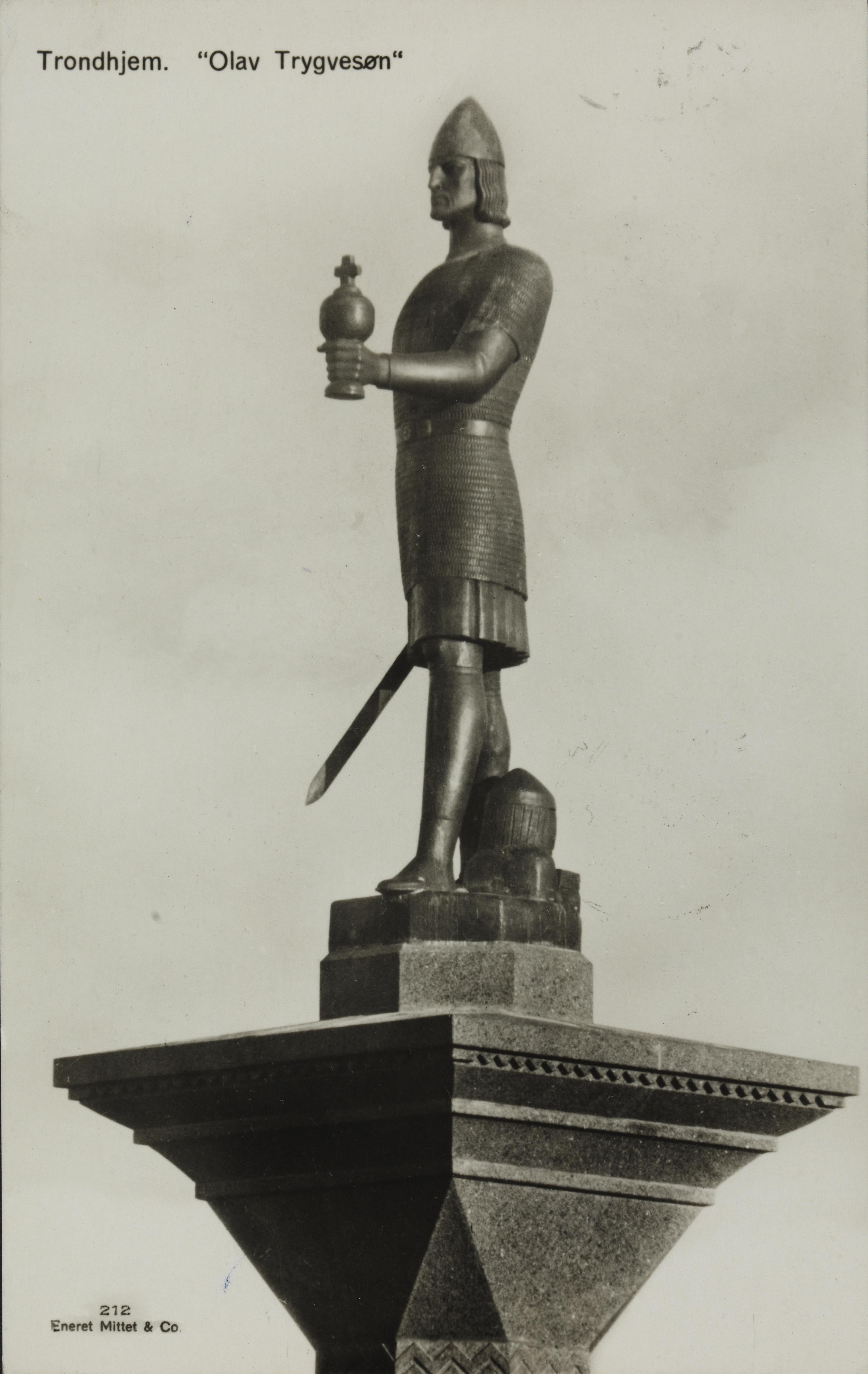 Bildet er hentet fra Nasjonalbibliotekets bildesamling Midtbyen,Torget, Trondheim, Sør Trøndelag